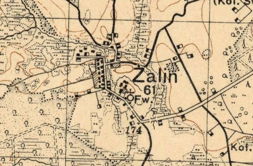 Żalin (gm. Ruda Huta, pow. chełmski) na mapie Wojskowego Instytutu Geograficznego z 1931 r.